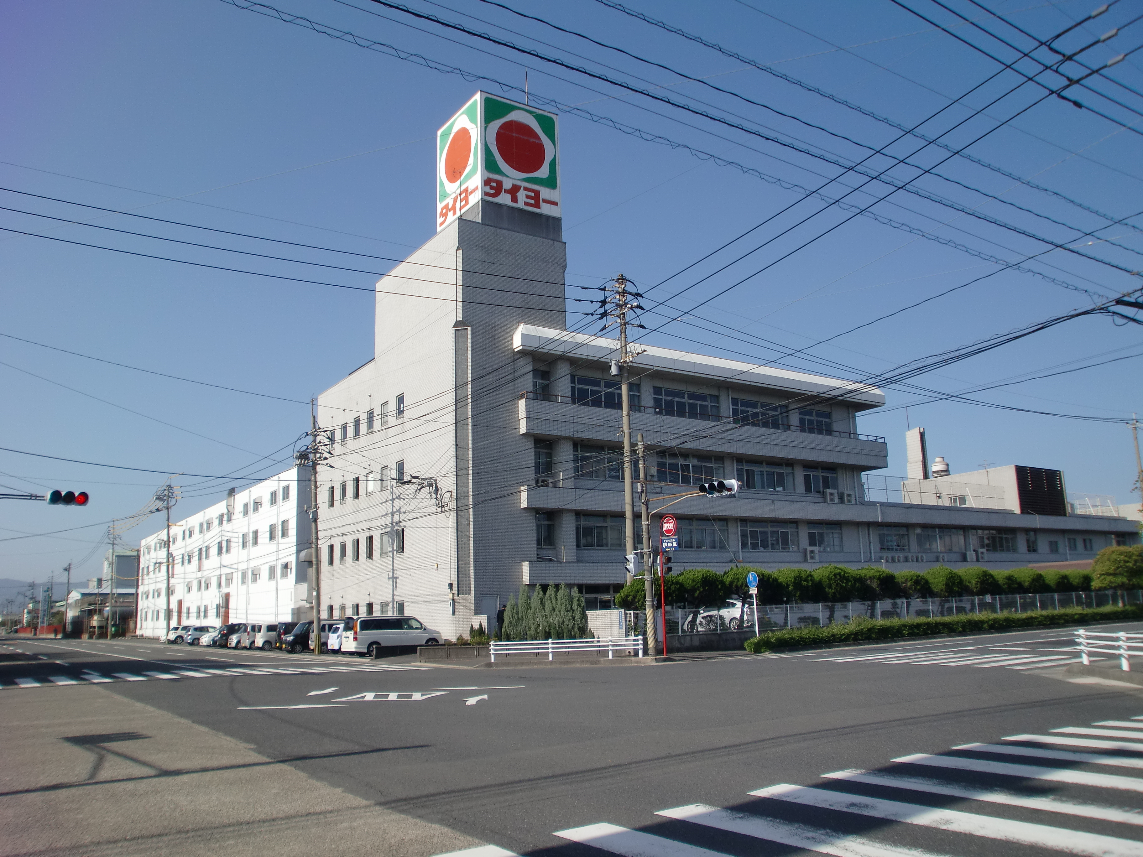 タイヨーの本社の画像。